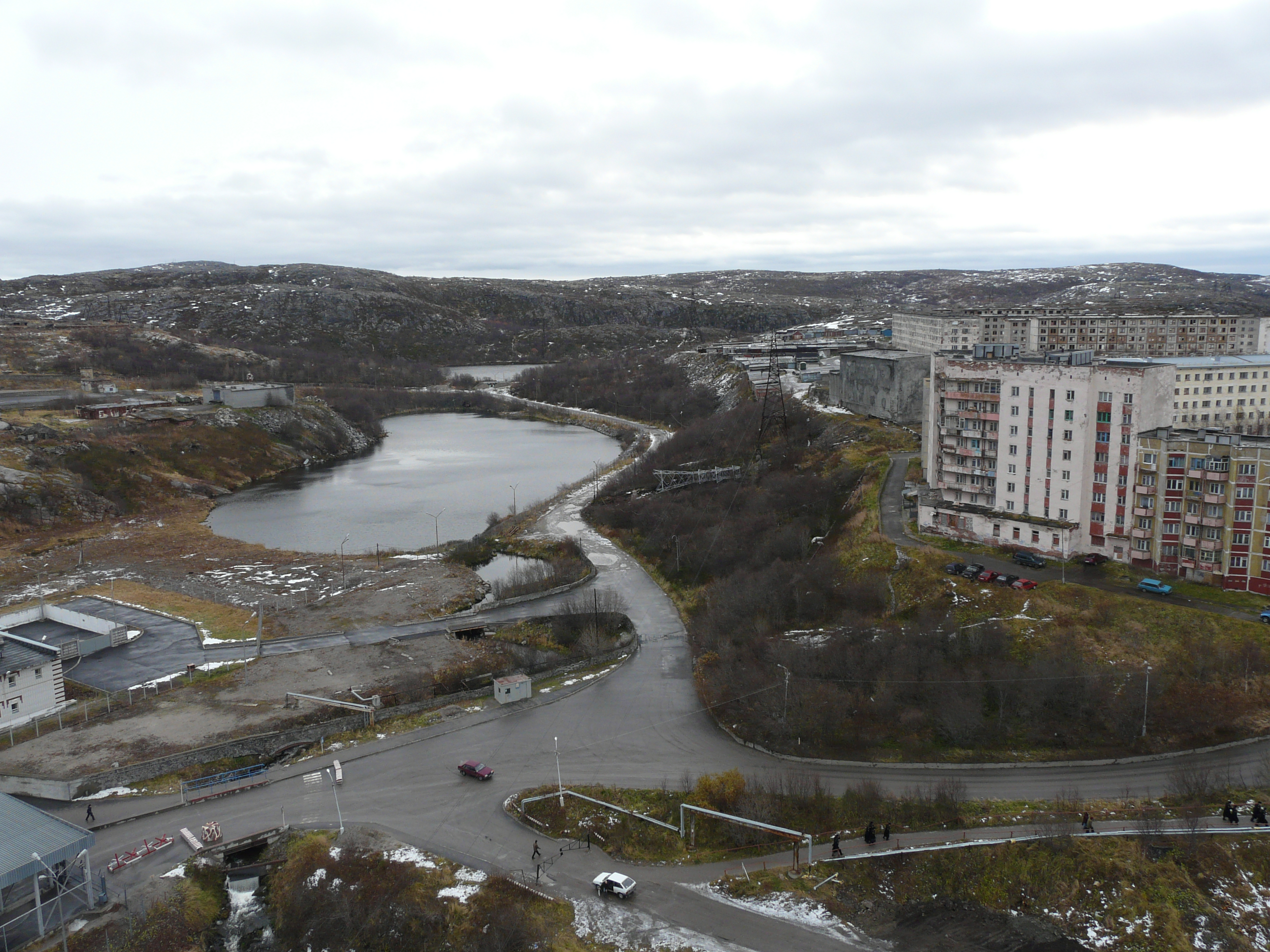 Озеро в Гаджиеве